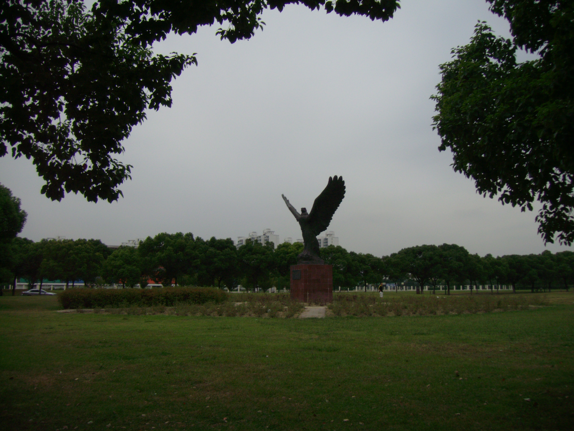 上海交大闵行校区